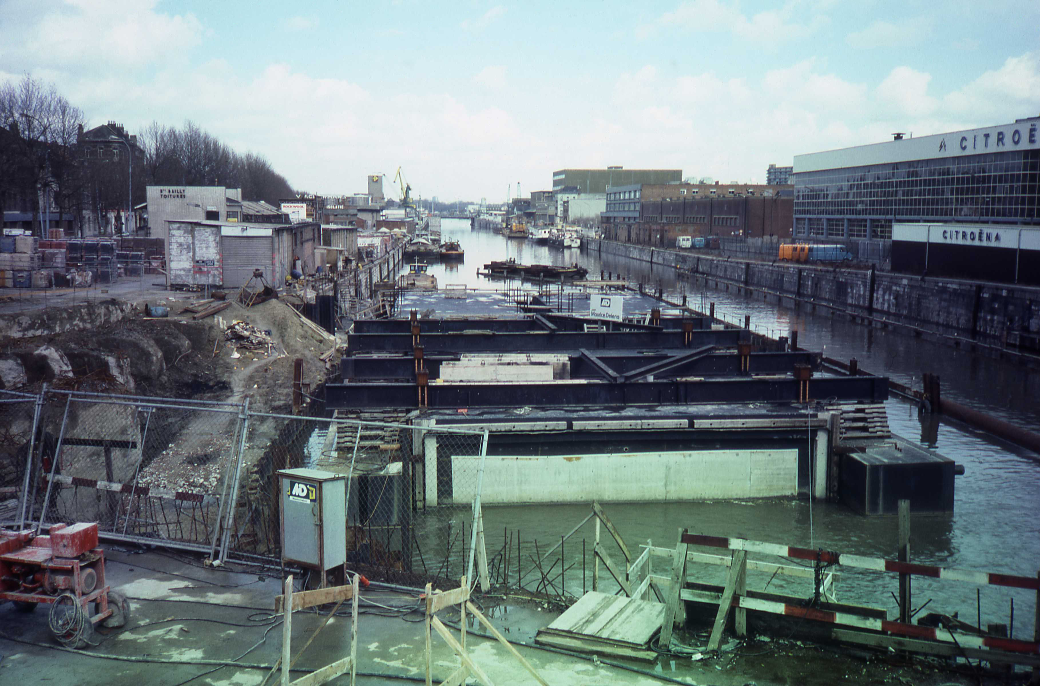 Drijvende tunnelelementen om de toekomstige metrolijn 2 nodig voor de kruising met het kanaal.